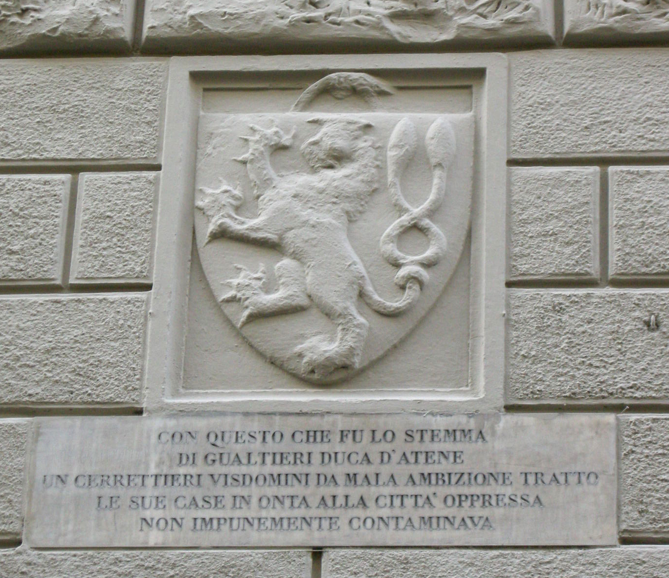 Via de' calzaiuoli, lapide visdomini e gualtieri di brienne